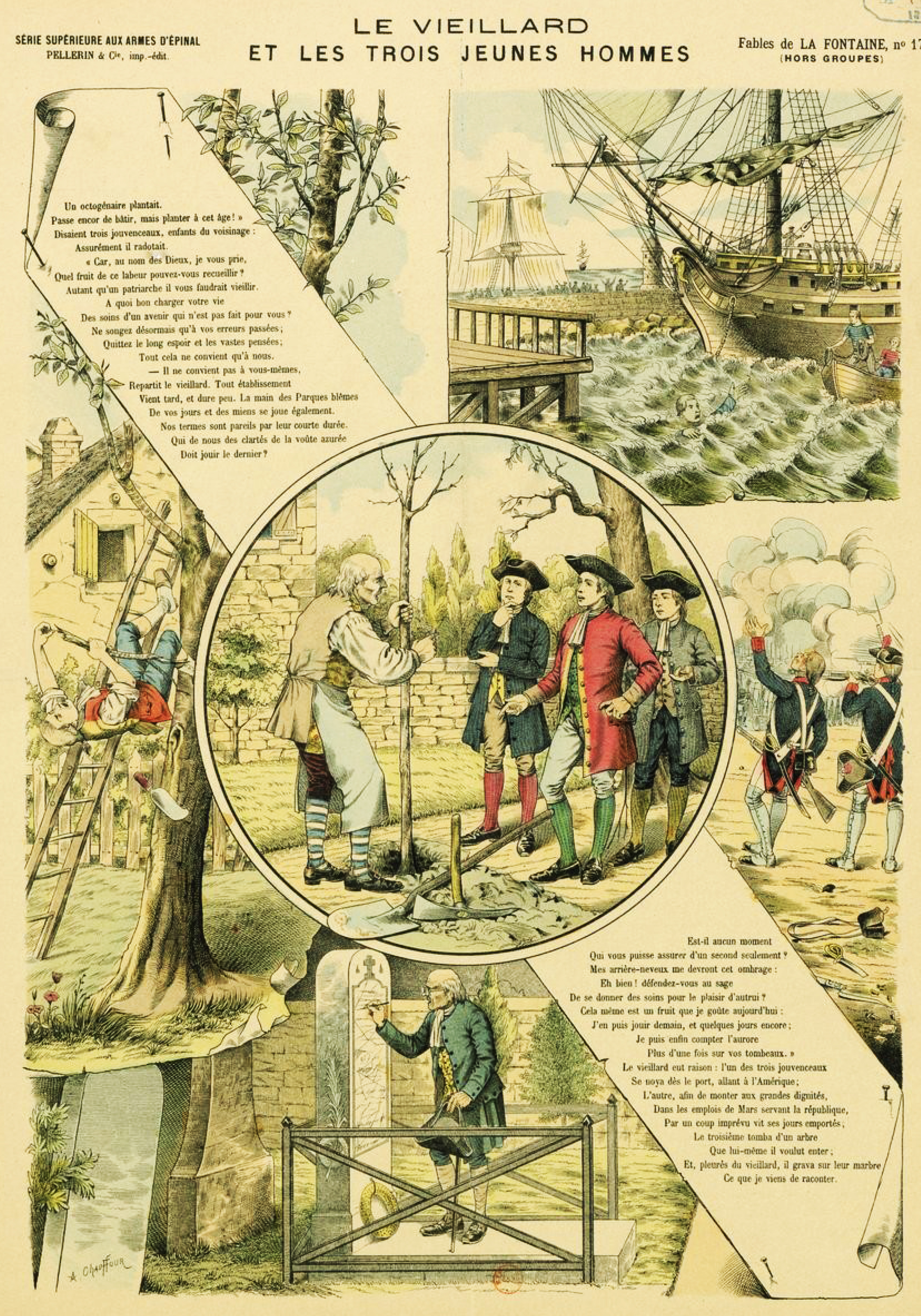 Estampe réalisée par E. Phosty représentant la fable Le Vieillard et les Trois Jeunes Hommes de Jean de La Fontaine (Epinal, édition Pellerin & Cie, 1895).